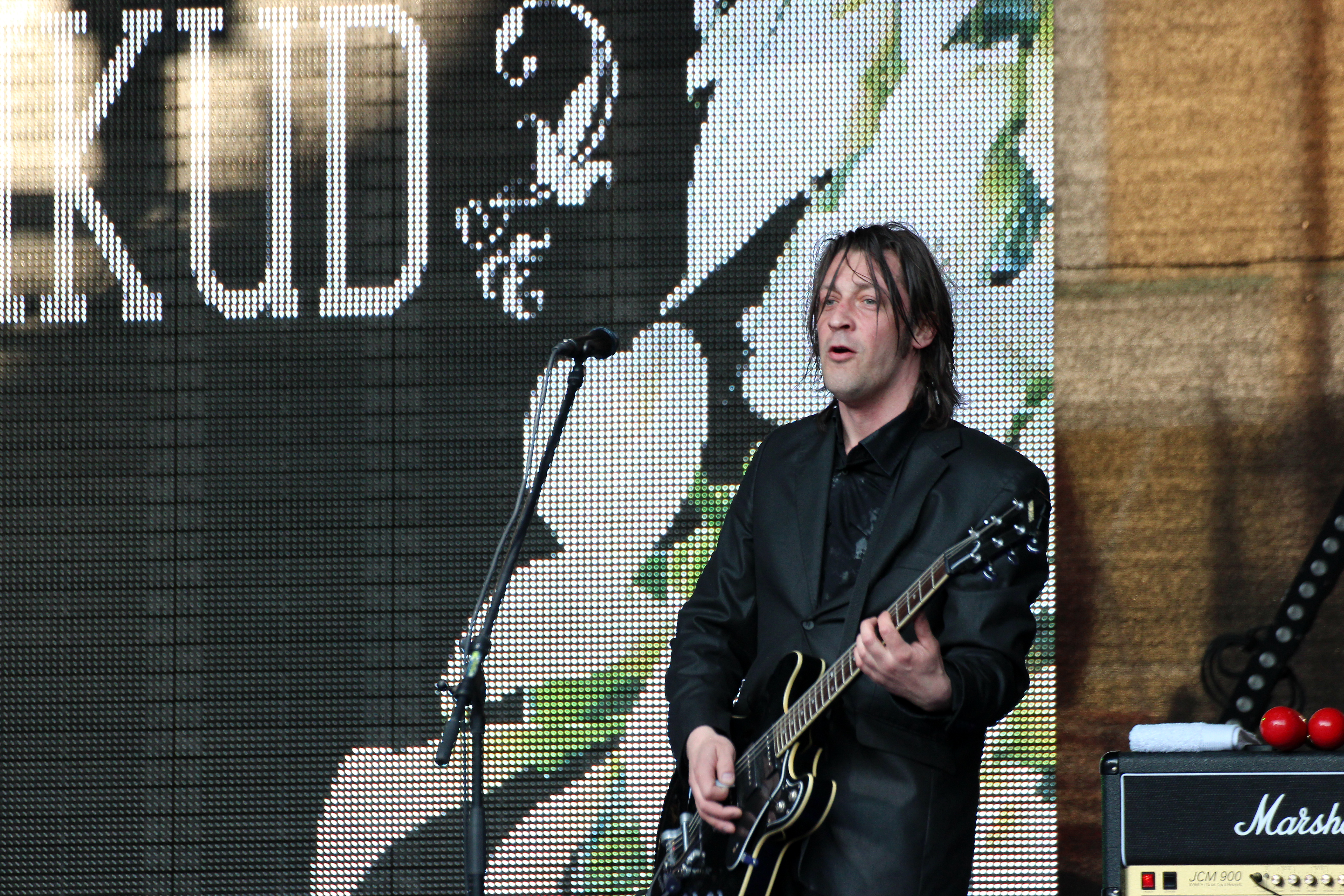 Aleksander Vana esinemas Tallinna Raekoja platsil ansambli Kosmikud koosseisus.